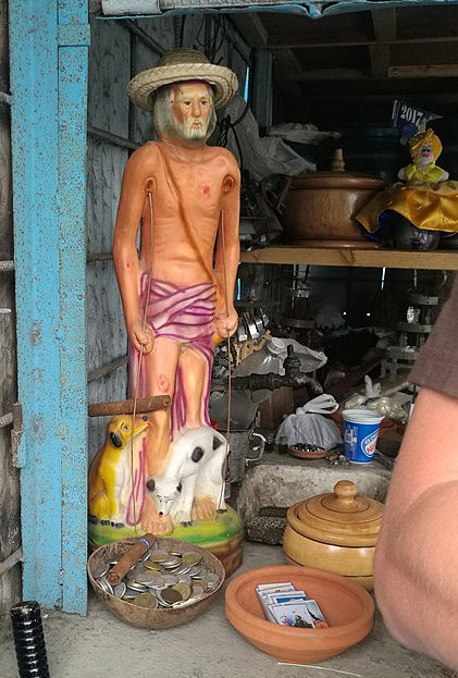 Statuo de Sankta Lazaro, la plej estimata sanktulo de Kubo, en santerio kultata kiel Babalu Aye. Santeria budo. Mantilla, Havano, Kubo.